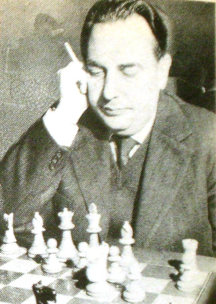 Raúl Sanguineti